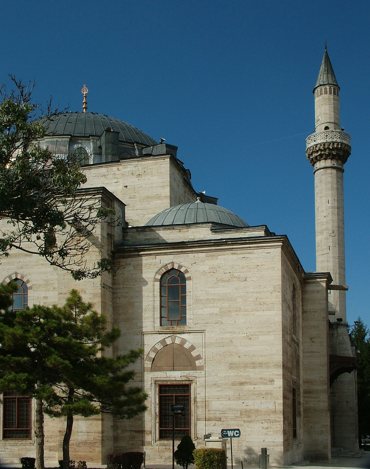 Szelimije-dzsámi (Konya, Törökország)